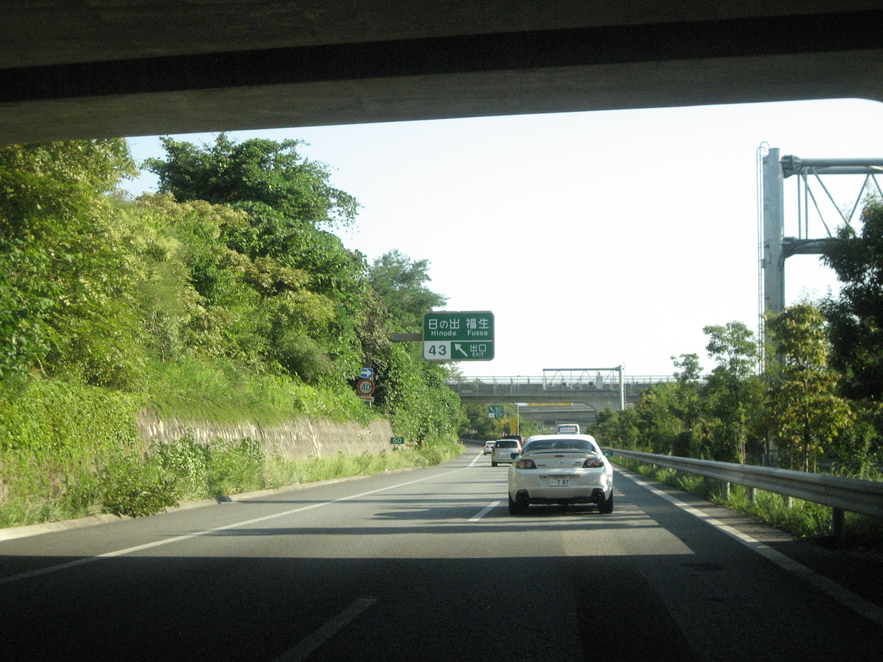 圏央道日の出IC付近